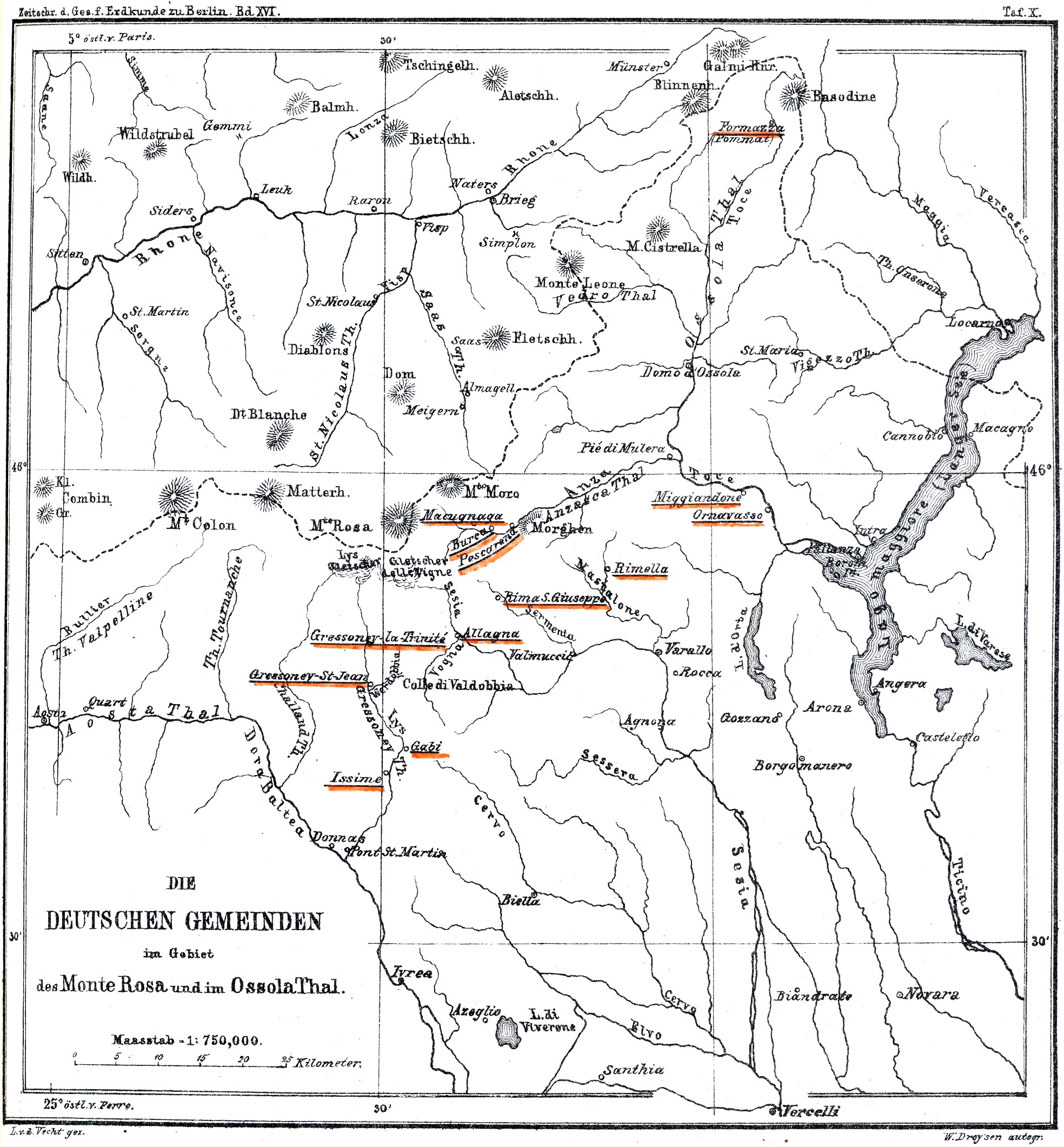 Deutsche Siedlungen (der Walser) in Oberitalien (Piemont und Aostatal)